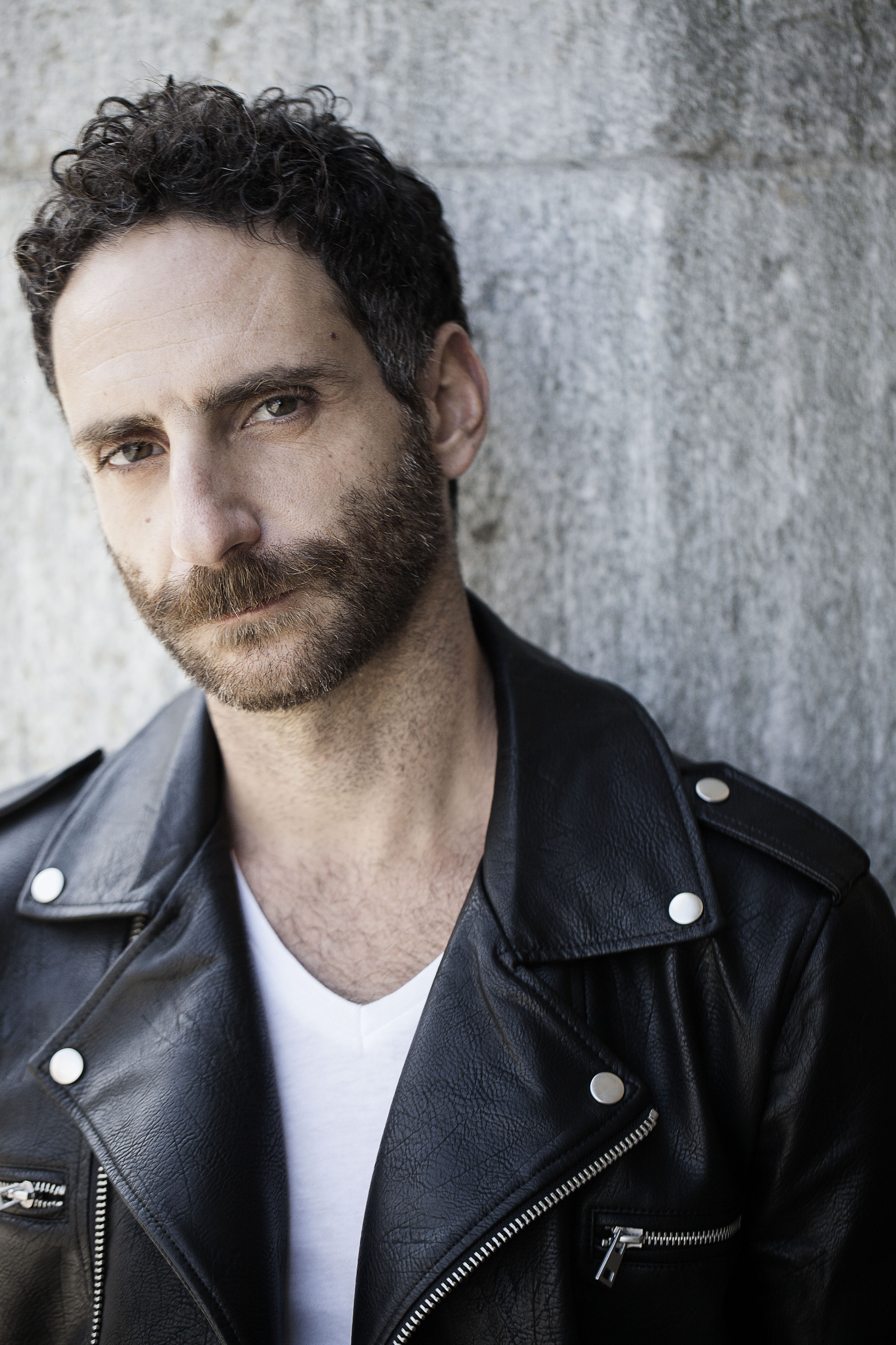 Simone Moretto